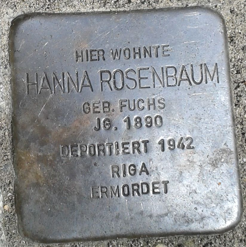 Stolperstein Datteln Mittelstraße 18 Hanna Rosenbaum